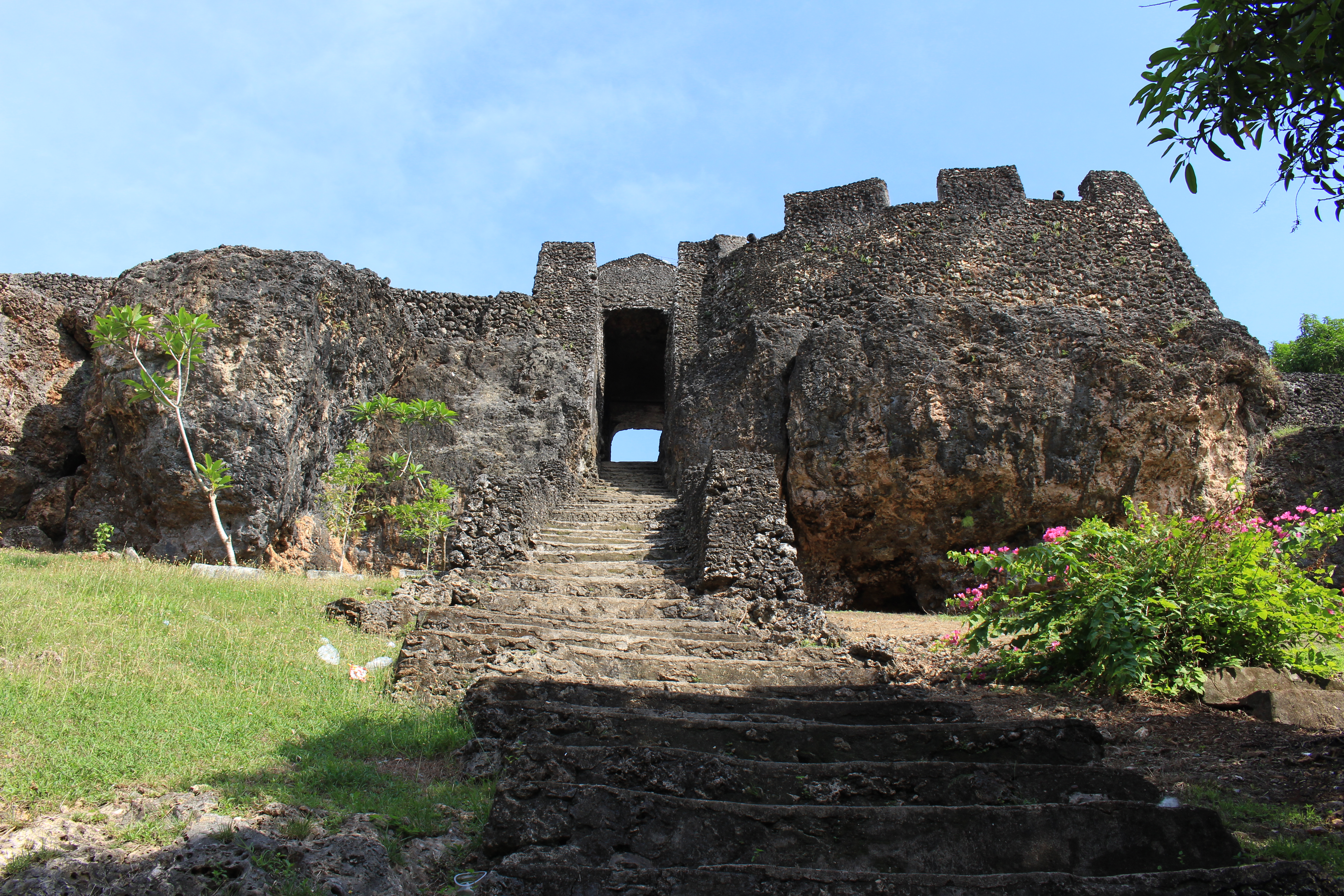 Lawana Wandailolo atau Gerbang Wandailolo adalah gerbang yang menghubungkan kampung Wajo dan Benteng Keraton Buton.